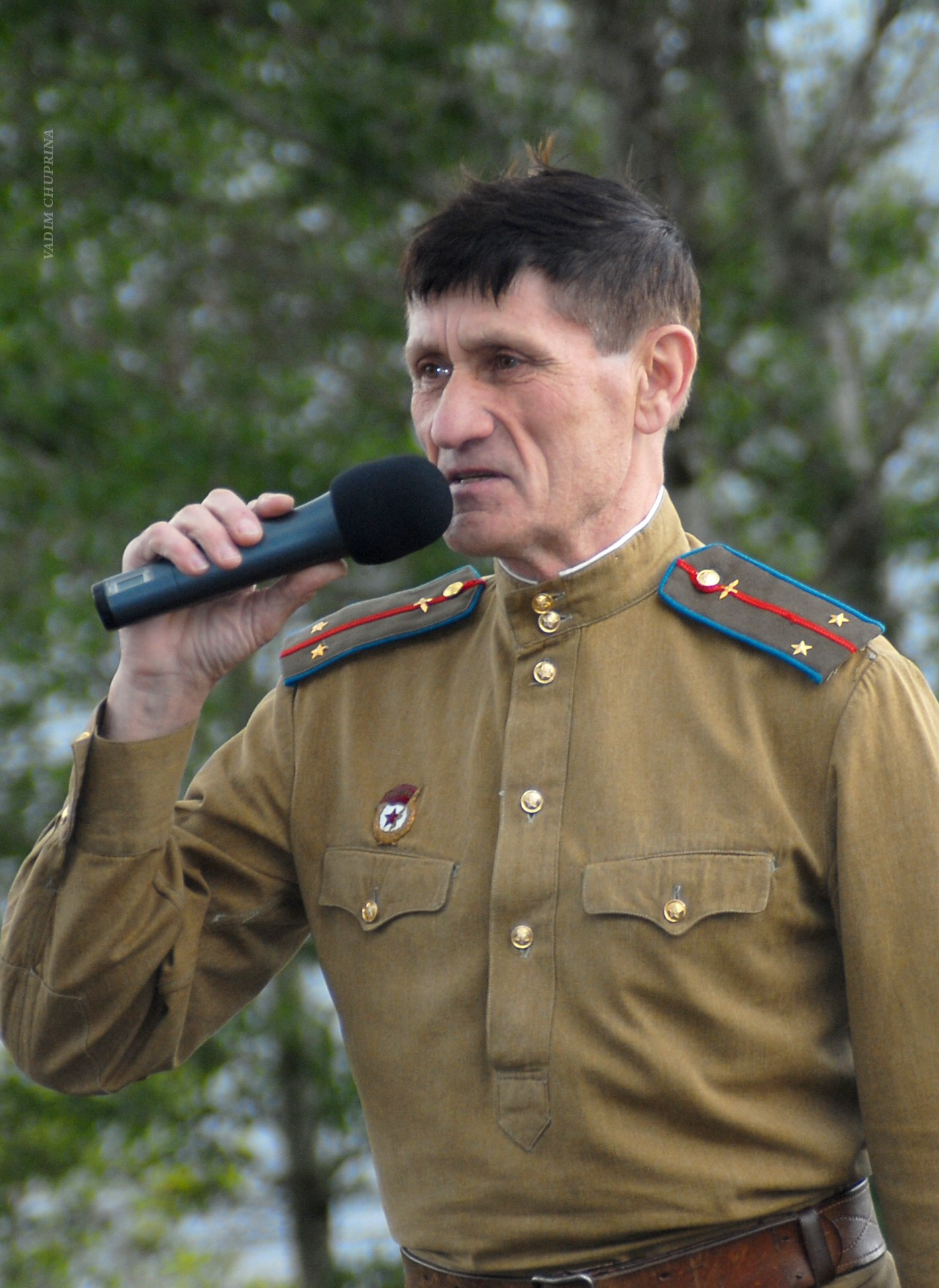 Федоринский, Алим Владимирович ,фото Чуприна Вадим